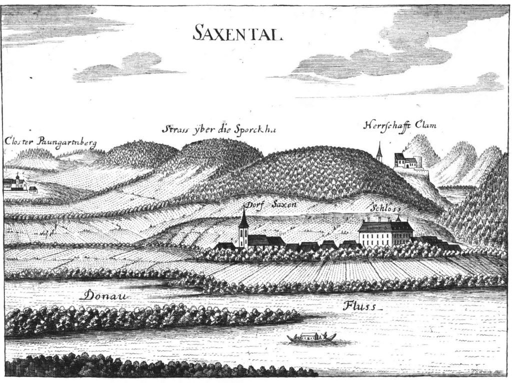 Schloss Saxental nach einem Stich von Georg Matthäus Vischer von 1674